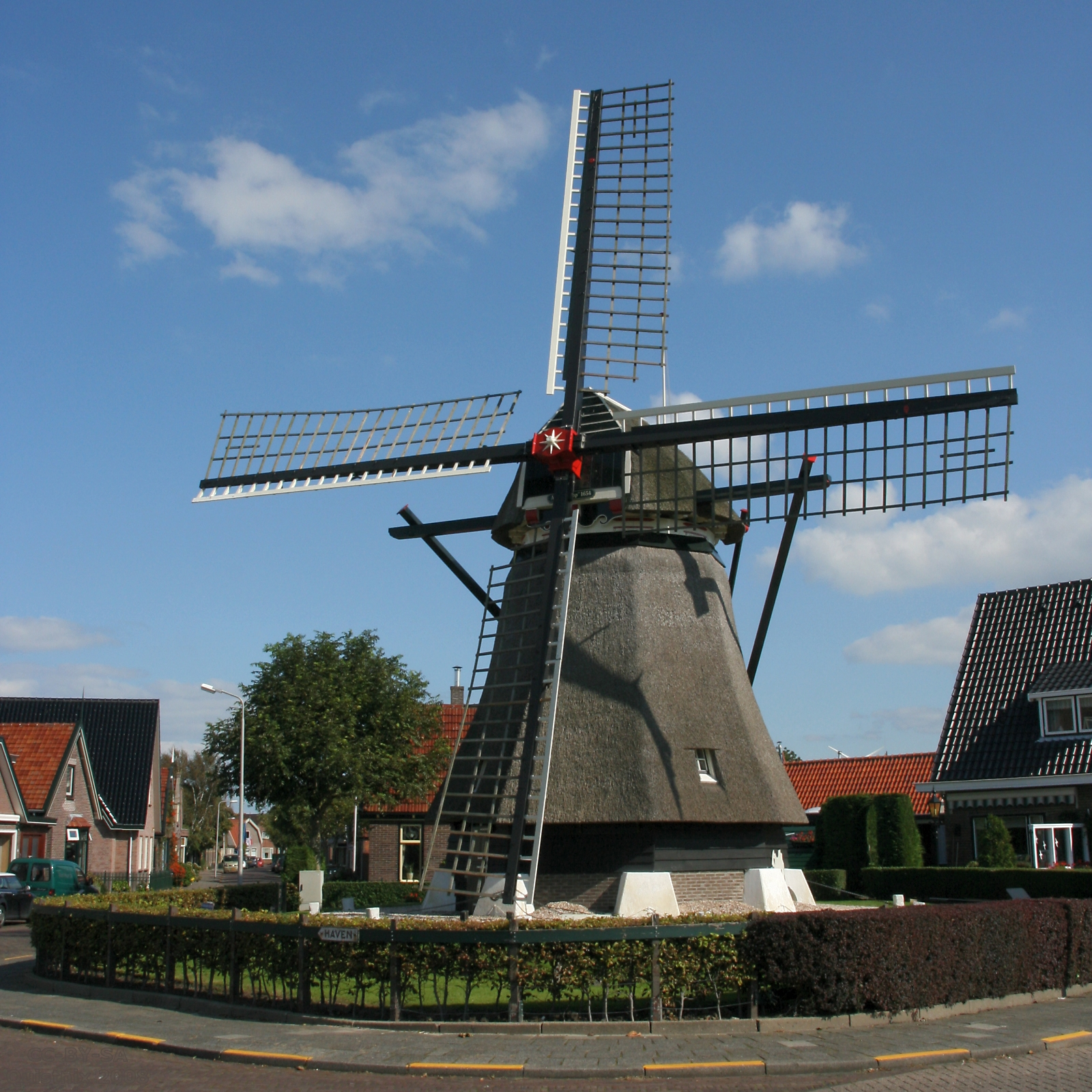 Den Oever: molen De Hoop